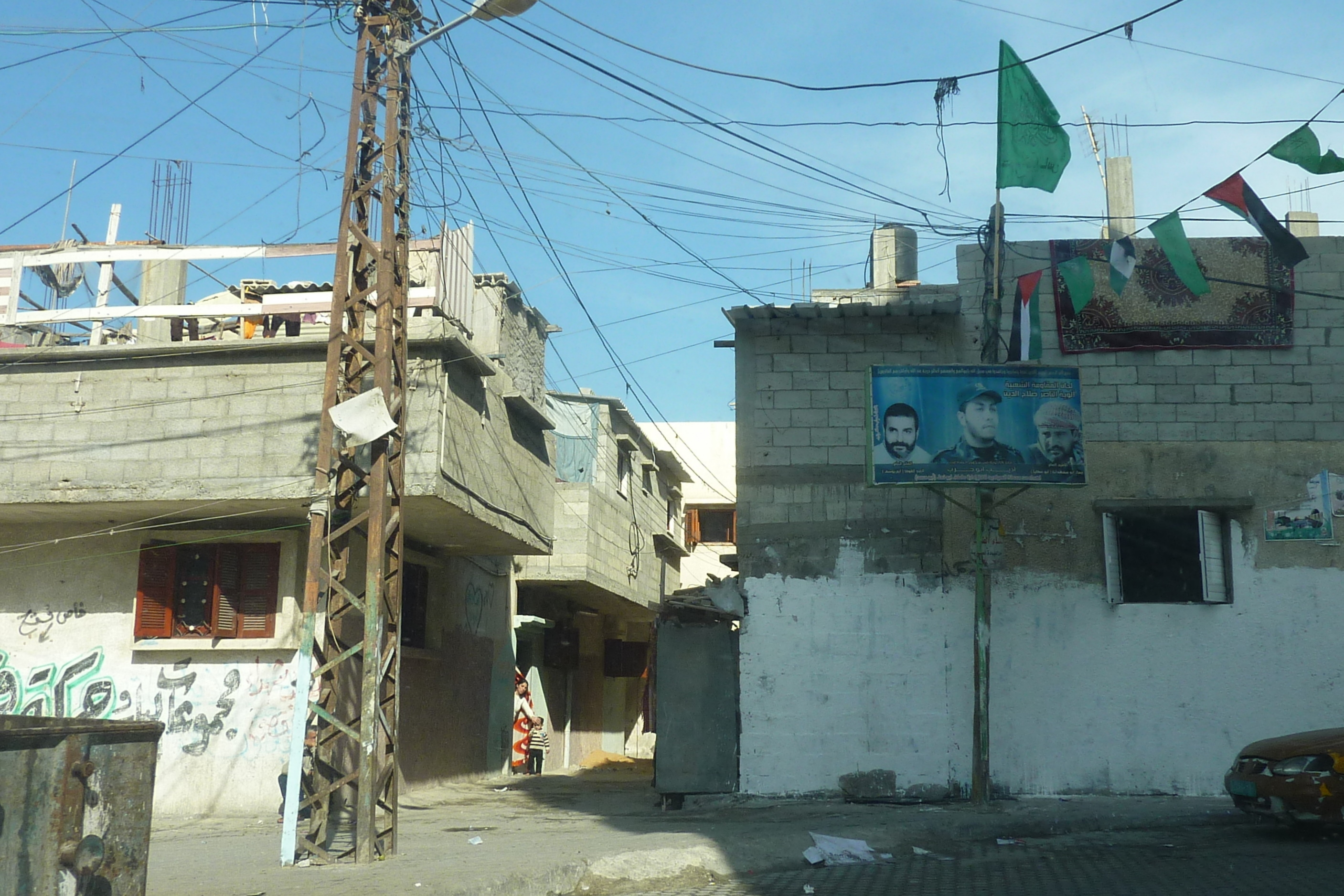 Shati RC